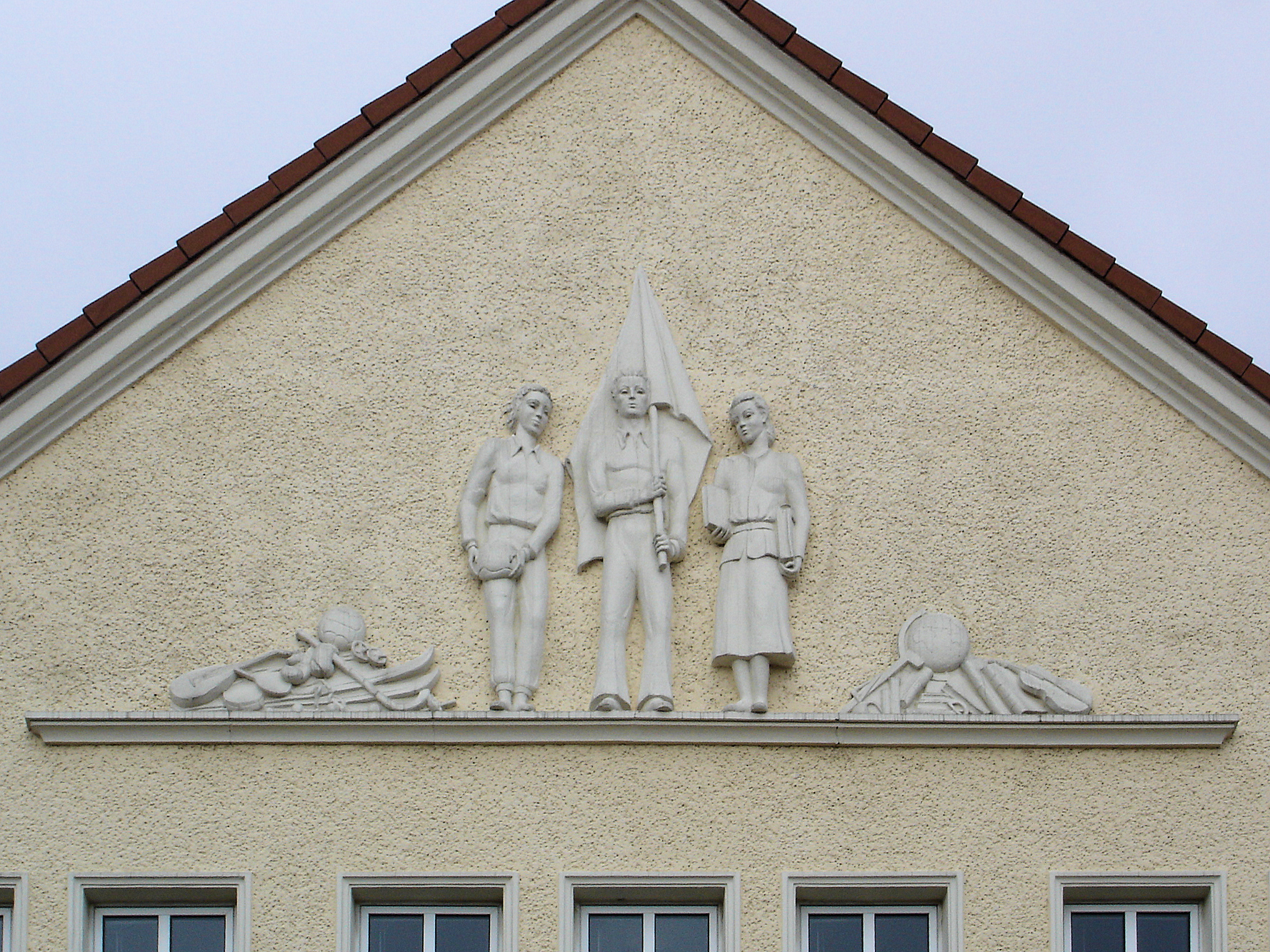 Mensa St-Georg-Str. Rostock, Relief "Jugend" von Margarete Scheel 1953/55